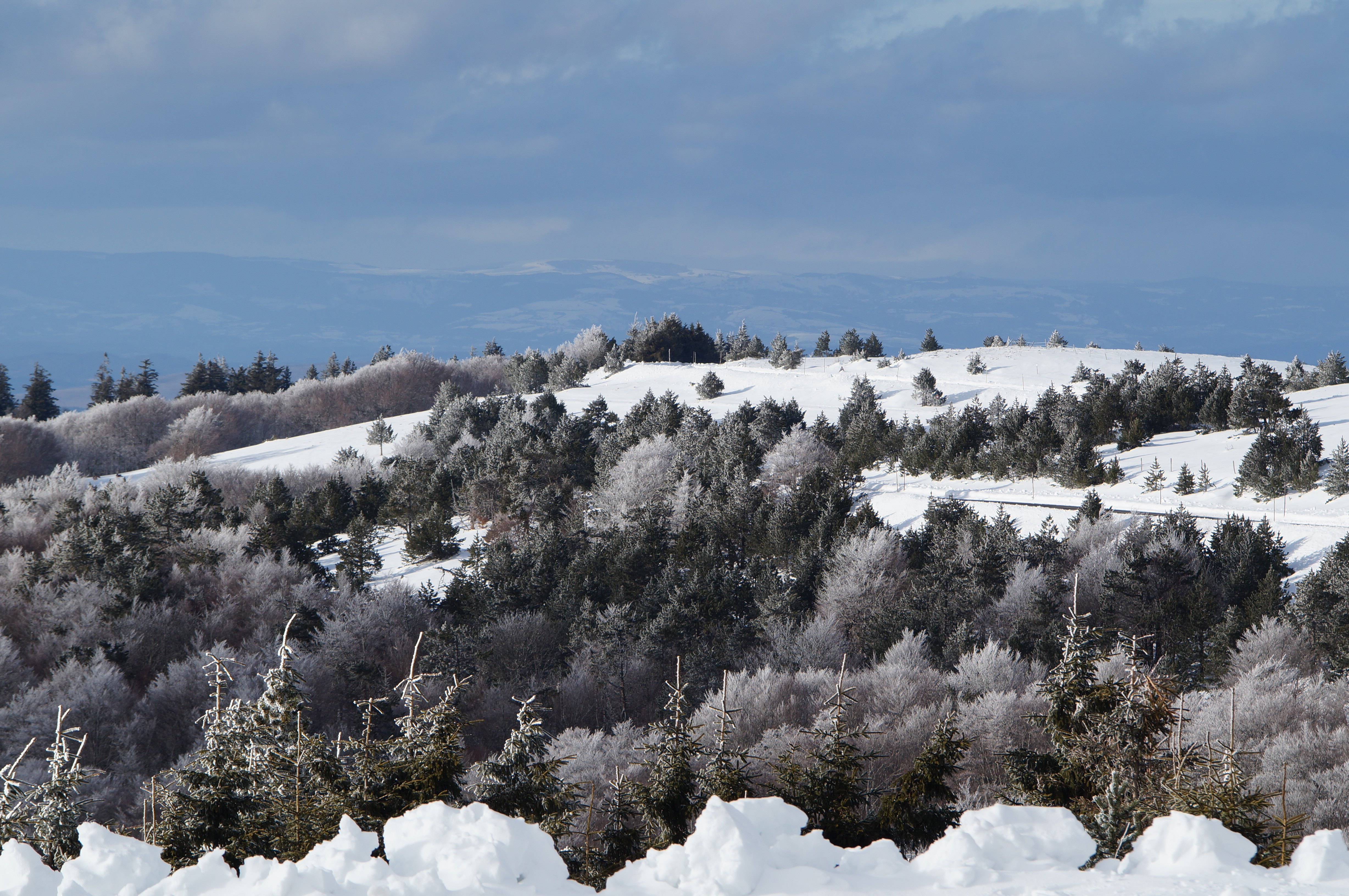 Paysage vu à partir du sommet du Mont Aigoual